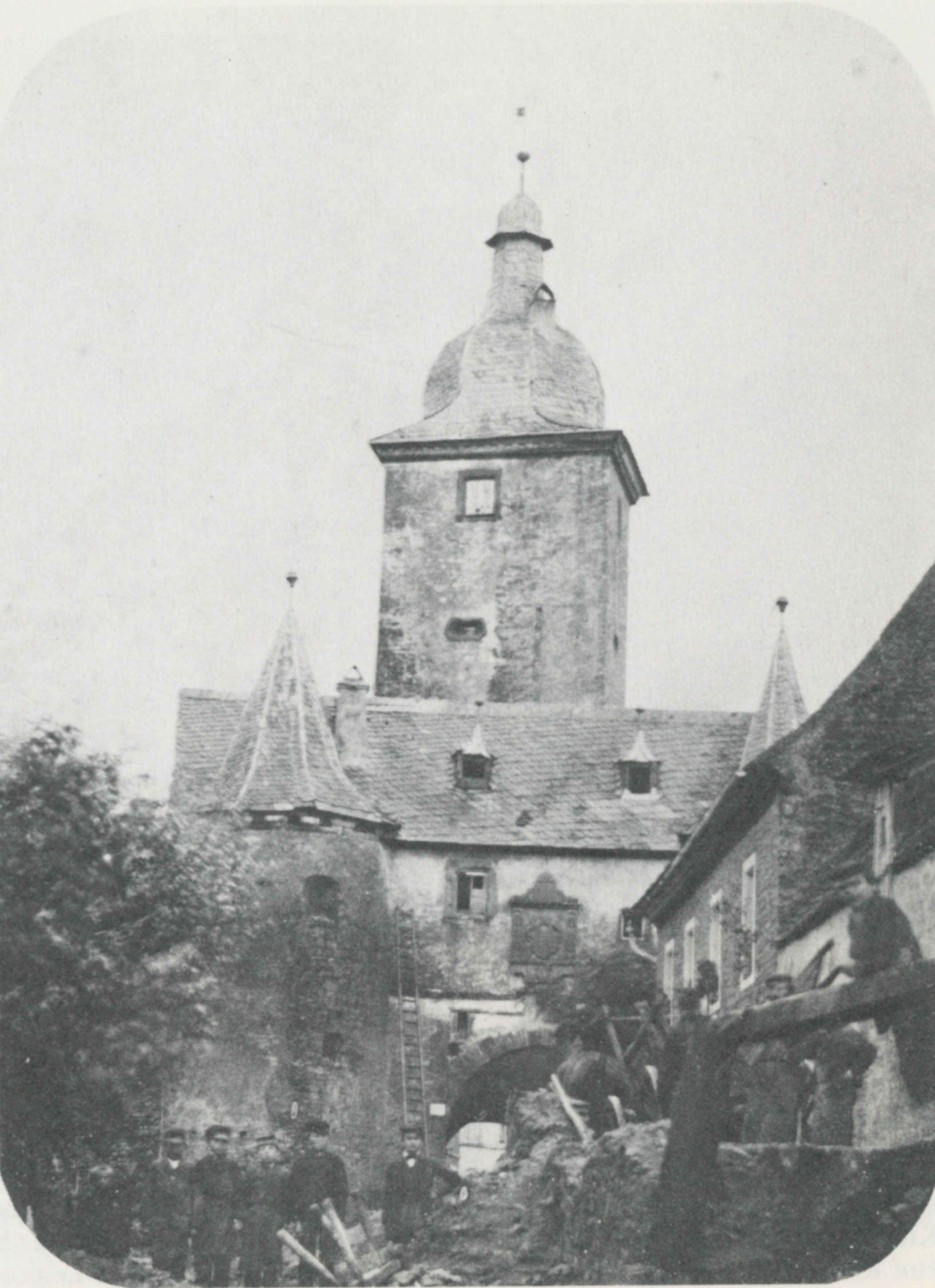 Fotografie des Unteren Tores in Volkach mit dem Vorwerk kurz vor dem Abriss im September 1870.